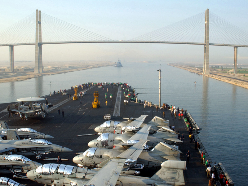 美國華盛頓號航空母艦正要穿越蘇伊士運河友誼大橋 蘇伊士運河是連接zh:地中海（大西洋）與zh:紅海（印度洋）之間最便捷的航道，而位於zh:埃及zh:卡達拉(El Qantara)、橫跨zh:運河兩岸的zh:蘇伊士運河友誼大橋(Suez Canal Friendship Bridge)則是運河沿線最重要的標的建築之一。 圖中所見是正航行於蘇伊士運河中，即將要穿越蘇伊士大橋底下的美國尼米茲級核子動力航空母艦、華盛頓號(USS George Washington CVN-73)的飛行甲板。 本照片下載自美國海軍官方新聞網站，由美國海軍開放照片版權至公共領域。